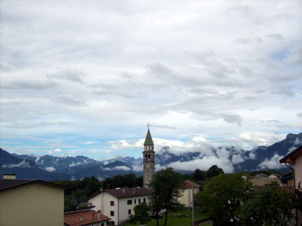 Lauco (UD - Friuli-Venezia Giulia - Italy), panorama con la chiesa